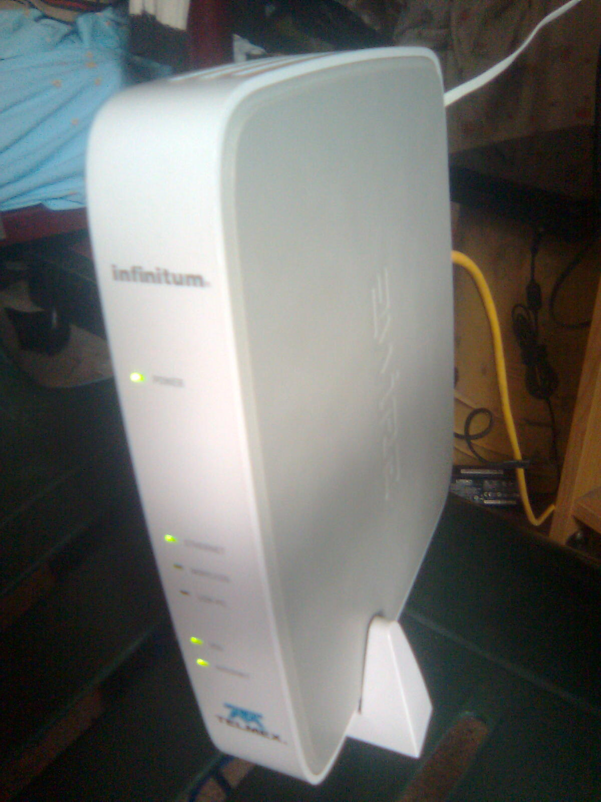 Modem telefonico 2WIRE Con servicio provisto por Telmex. modem relefonico marca 2wire